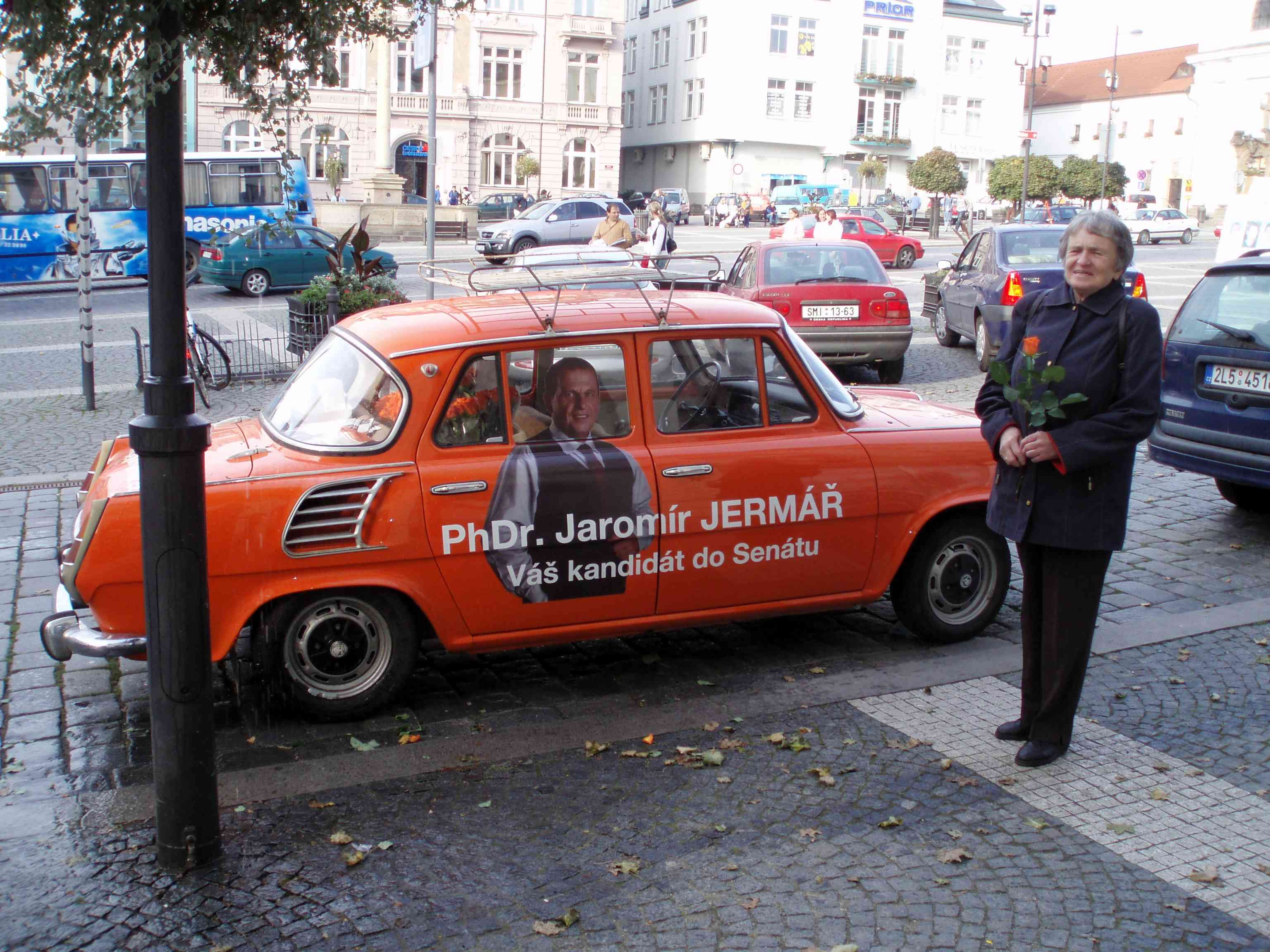 Wahlkampfveranstaltung Turnov